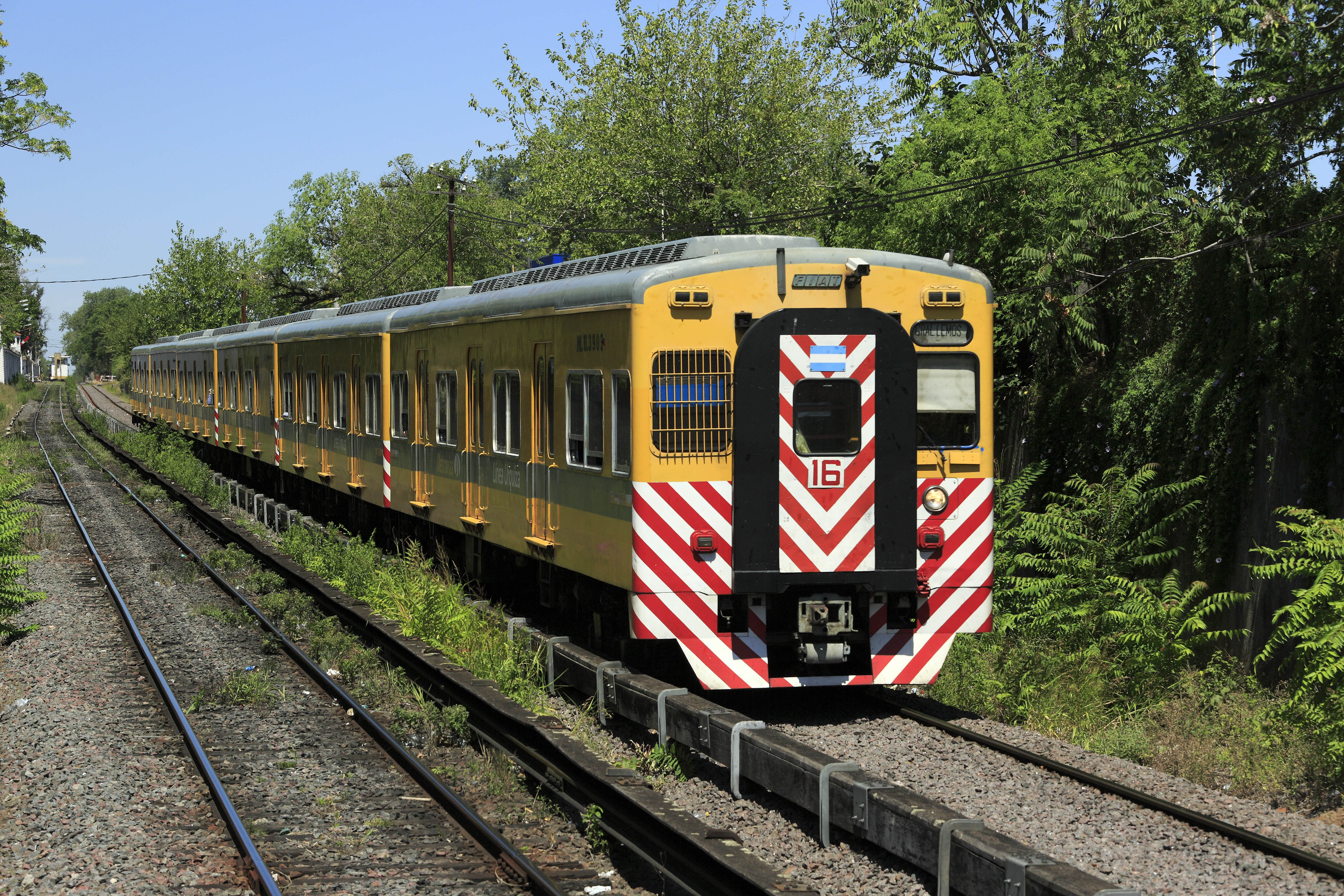 S-Bahn-Zug Federico Lacroze–General Lemos vom Bahnsteig aus. Was es mit dem »FIAT«-Schriftzug über dem Wagenübergang auf sich hat, ist nicht klar. Es gibt ihn nur an diesem Wagen und man hat extra die sonst in der Mittelachse angebrachte Kamera seitlich versetzt.